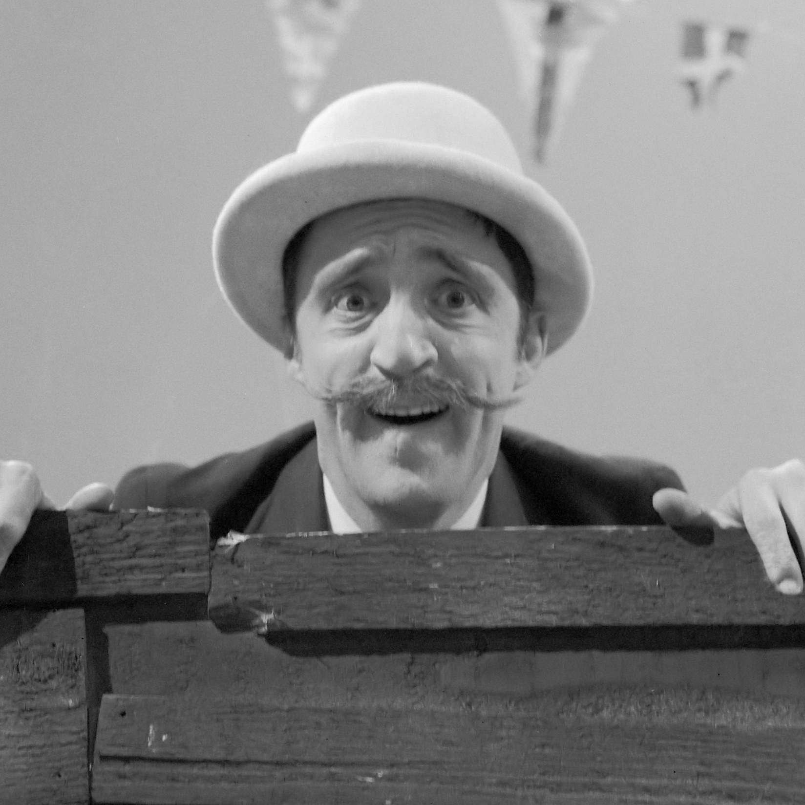 TV-show op 10 maart , opname in Cinetonestudio, Rob van Reyn 24 februari 1966